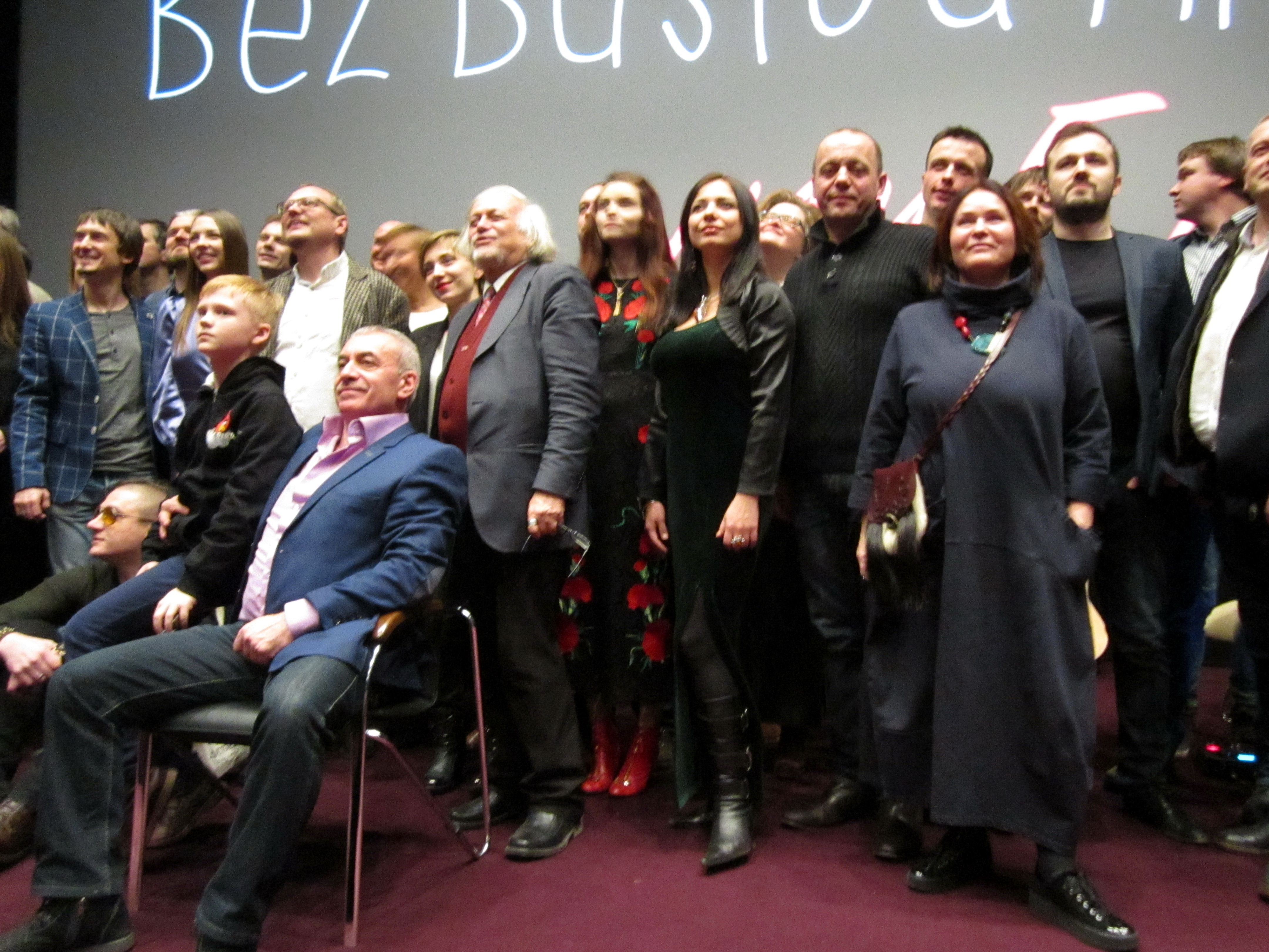 5-летие творческого объединения «Bez Buslou Arts». Персоны, принимавшие участие в создании проектов киностудии «Bez Buslou Arts»